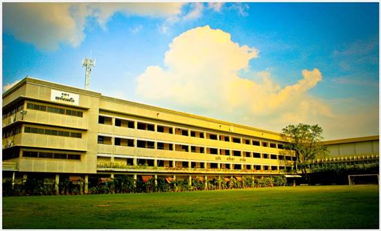 อาคารยอห์น บอสโก